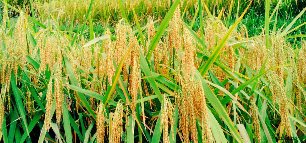 Padi Sawah Nyalindung Pasirhuni Cikadu Menguning